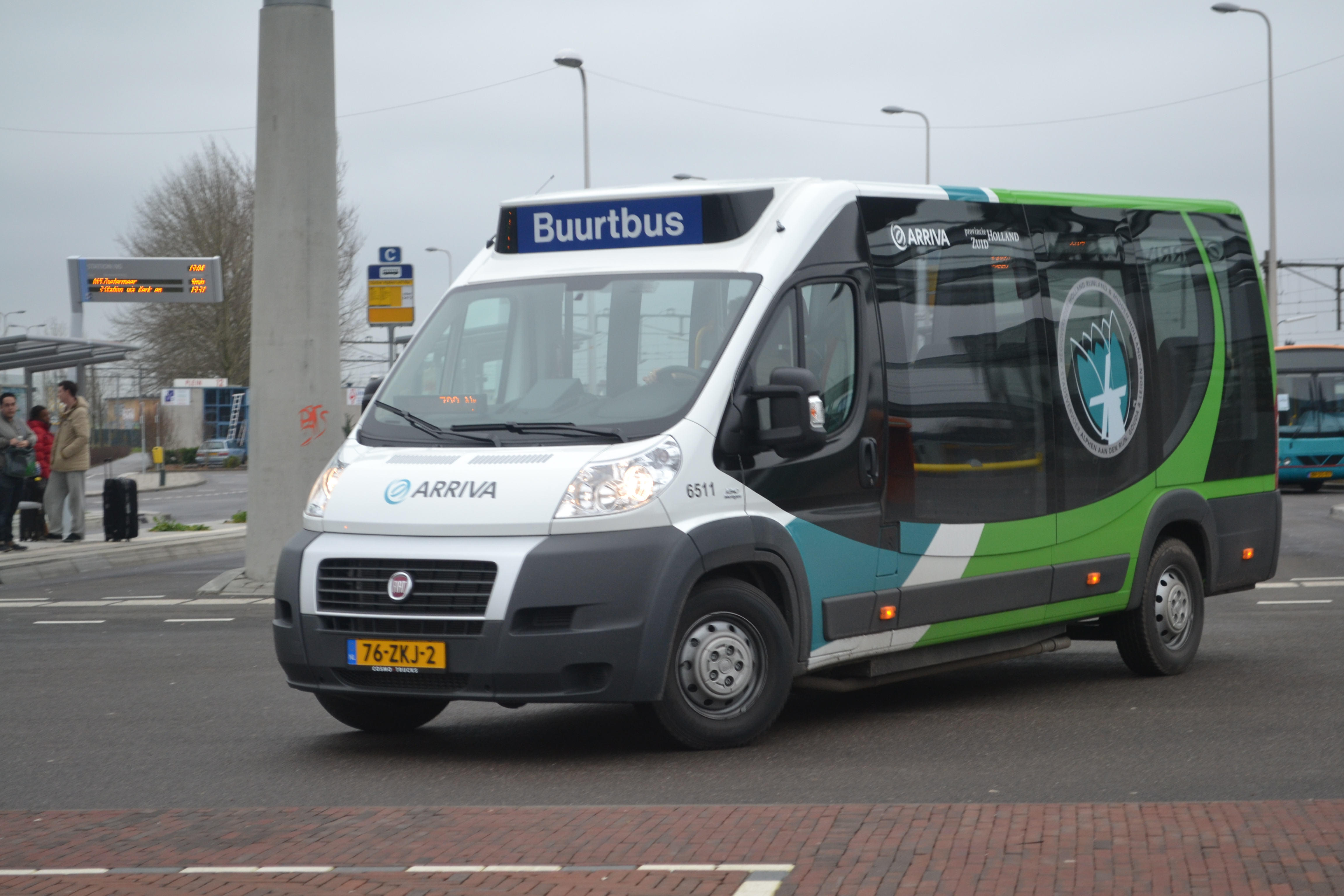 Arriva 6511, van het type Tribus Civitas, op het station van Alphen aan den Rijn